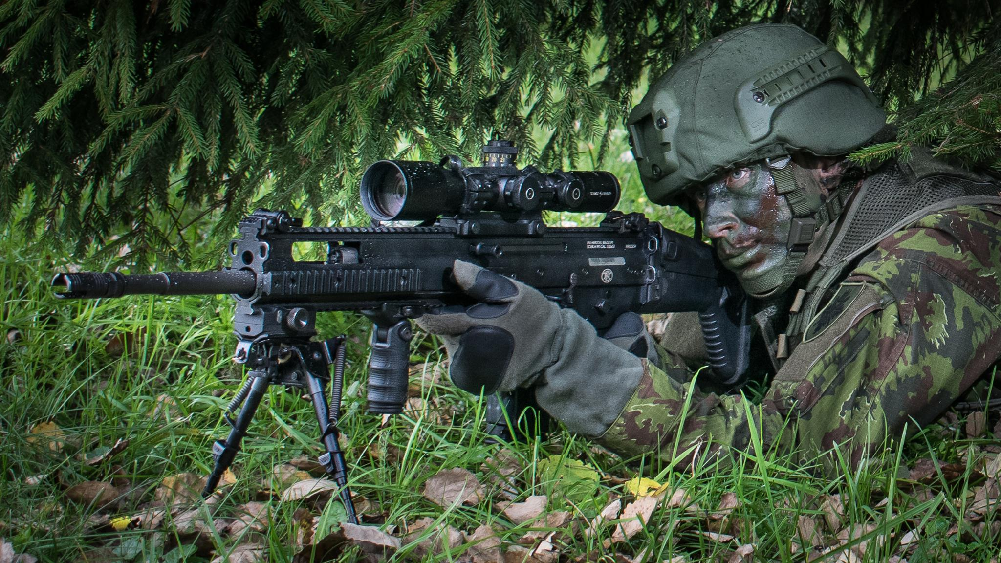 Taiklaus šaulio ginklas